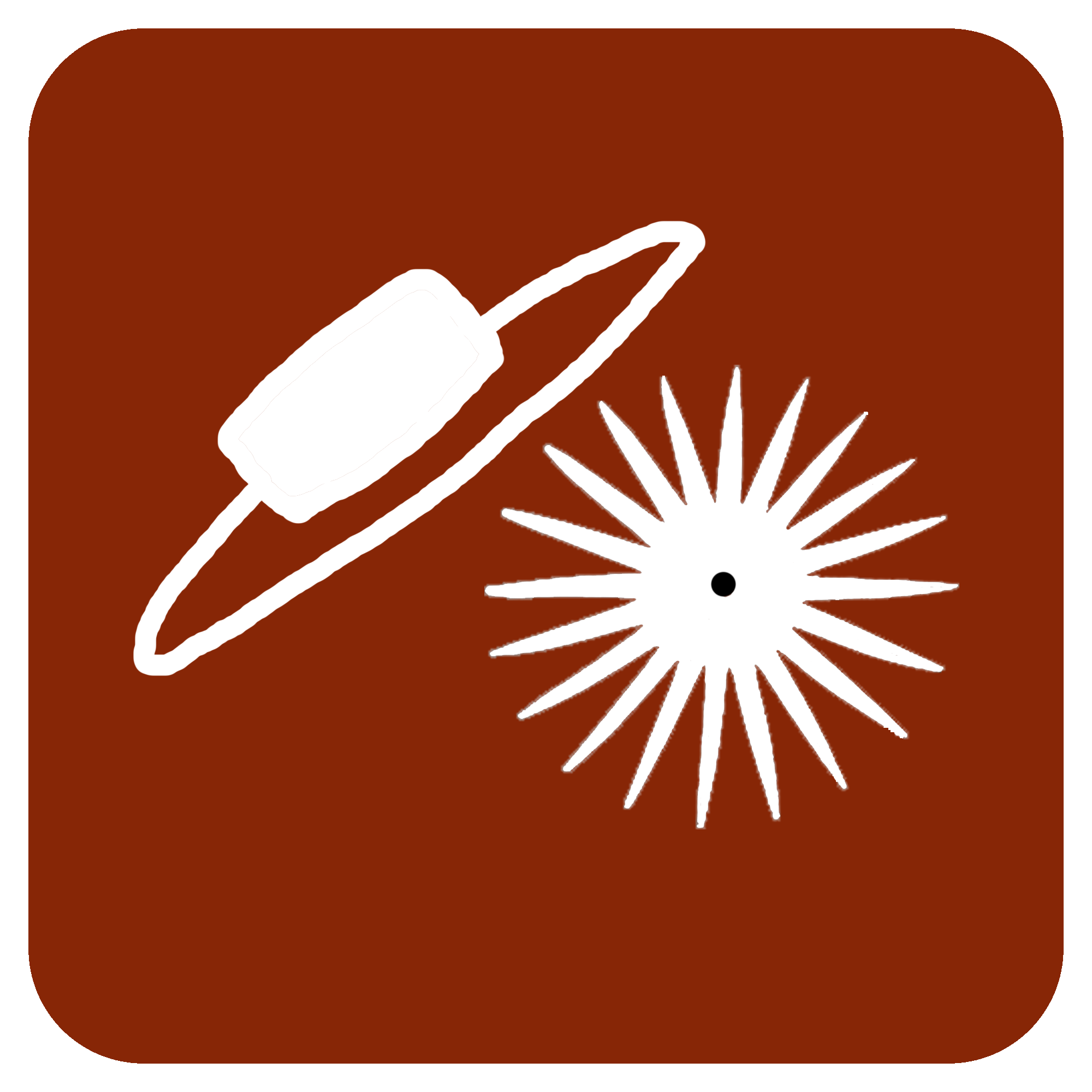 Símbolo utilizado para identificar a la estación San Fernando en 2001.